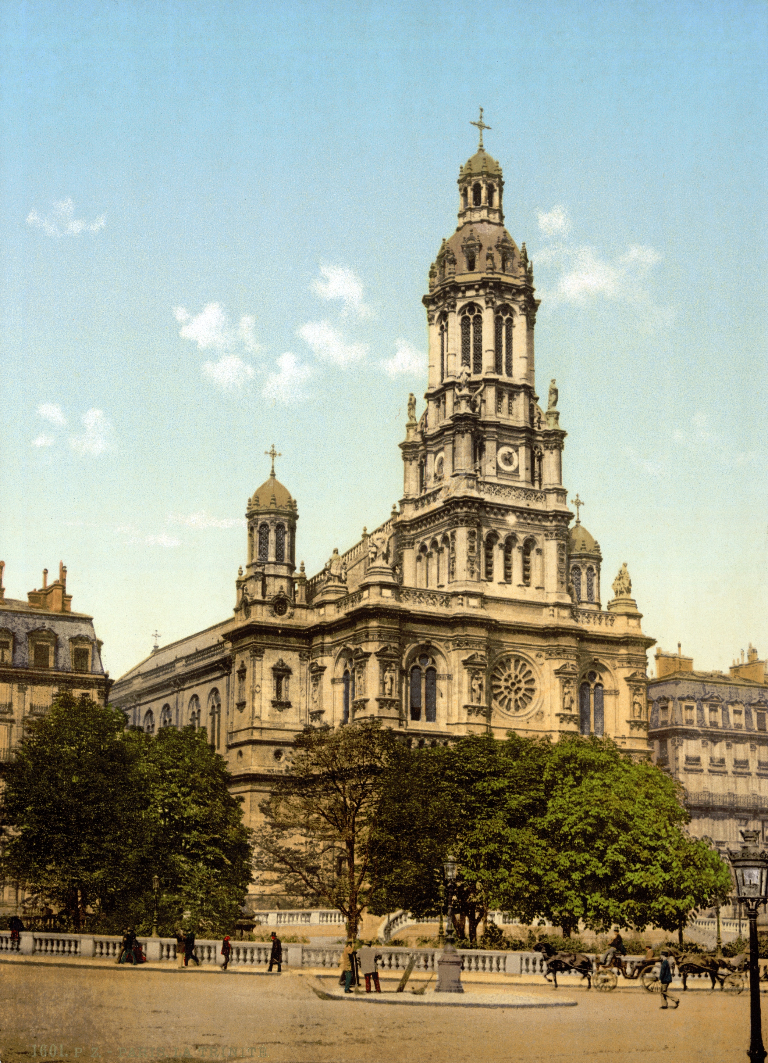 Église de la Sainte-Trinité de Paris